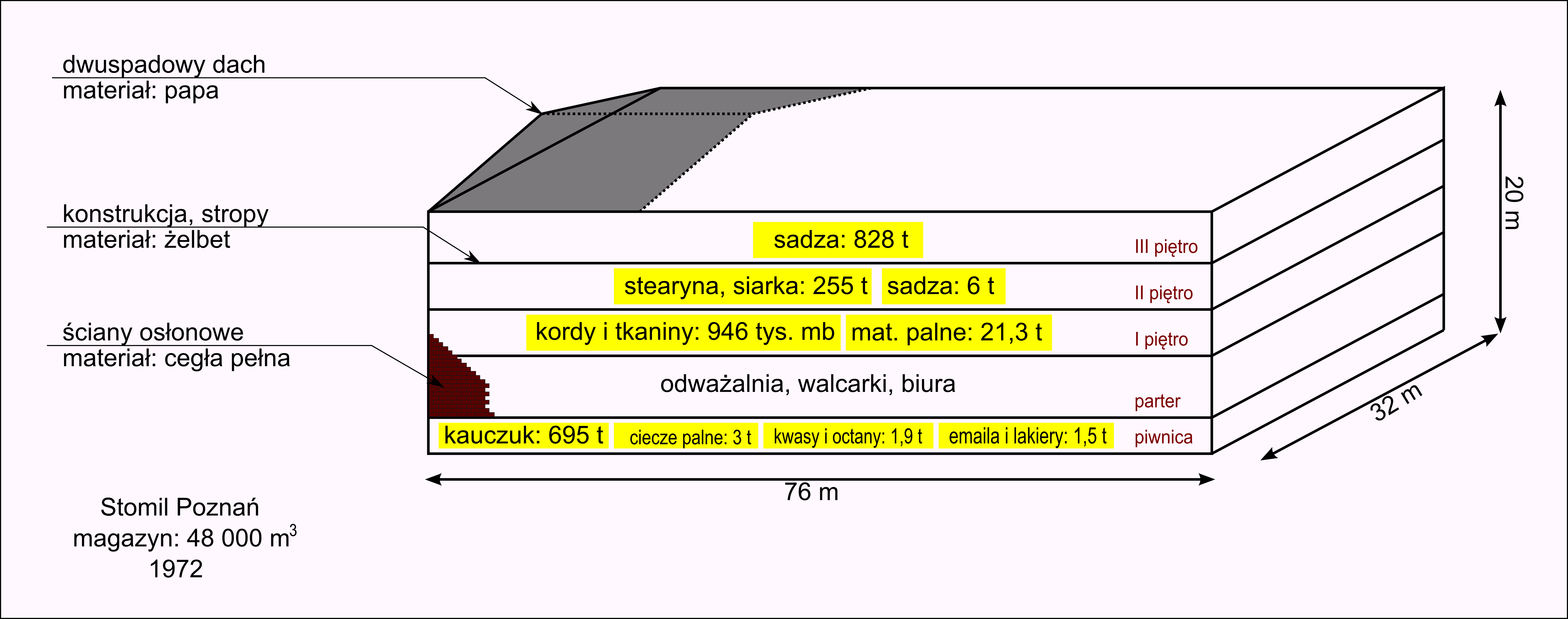 Wymiary, konstrukcja i rozmieszczenie materiałów w magazynie Stomilu podczas pożaru w 1972; liczby wg Przegląd Pożarniczy 6/2012, s. 46